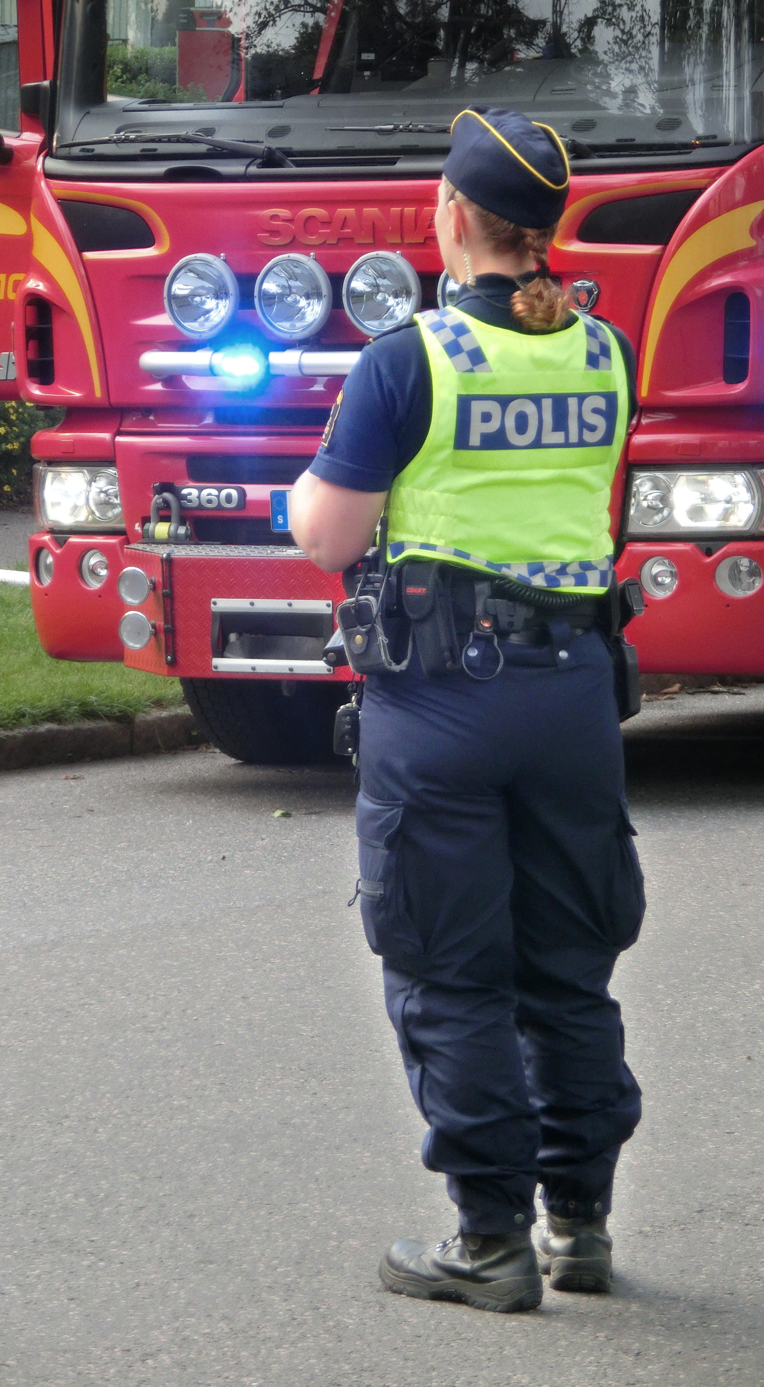 Brand på Förskolan Urd, Odengatan 15, kvarteret Urd, Falköping, Falköpings kommun, f.d. Skaraborgs län, Västergötland, Västra Götalands län, Sverige. En kvinnlig polis övervakar brandplatsen.